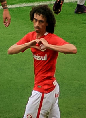 Valdívia em partida entre Inter X Cruzeiro em 2016